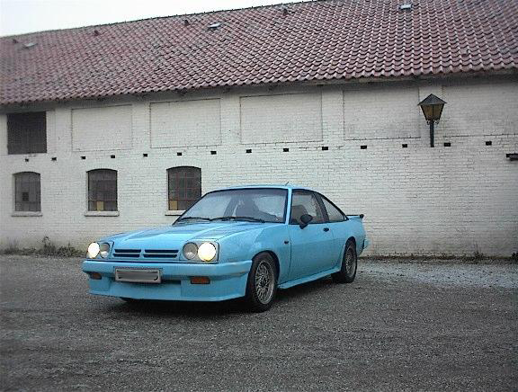 Opel Manta B